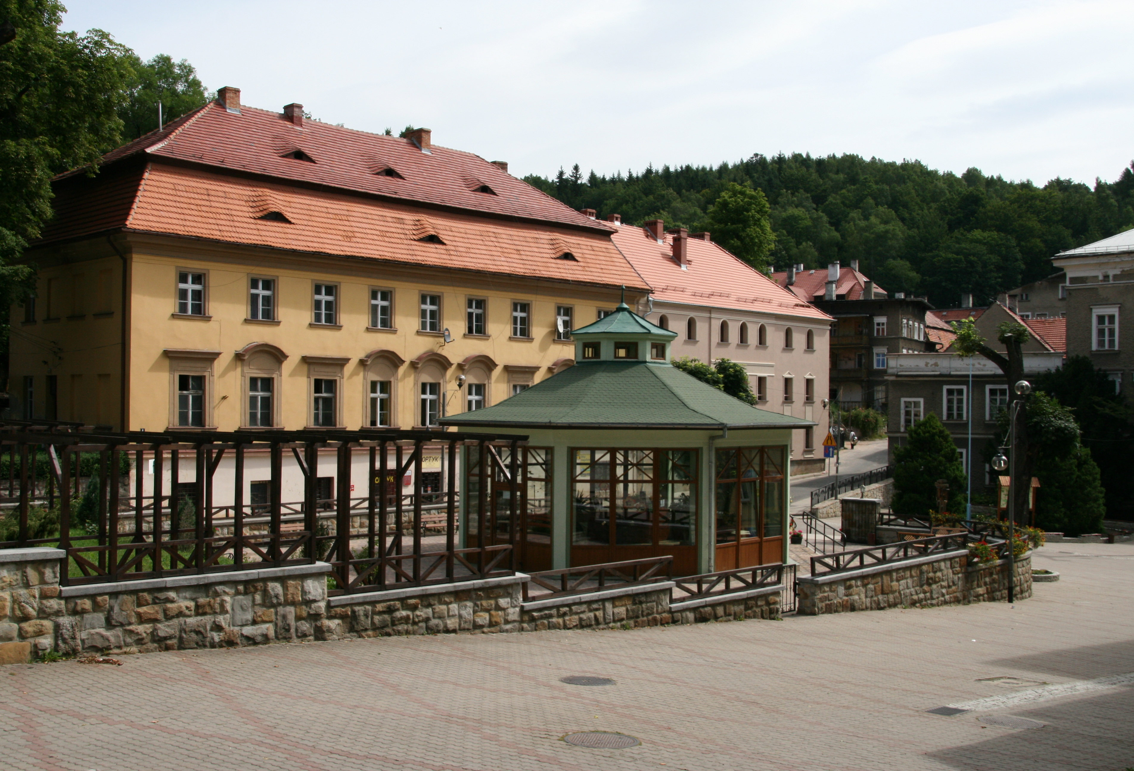 Jedlina Zdrój - Spa